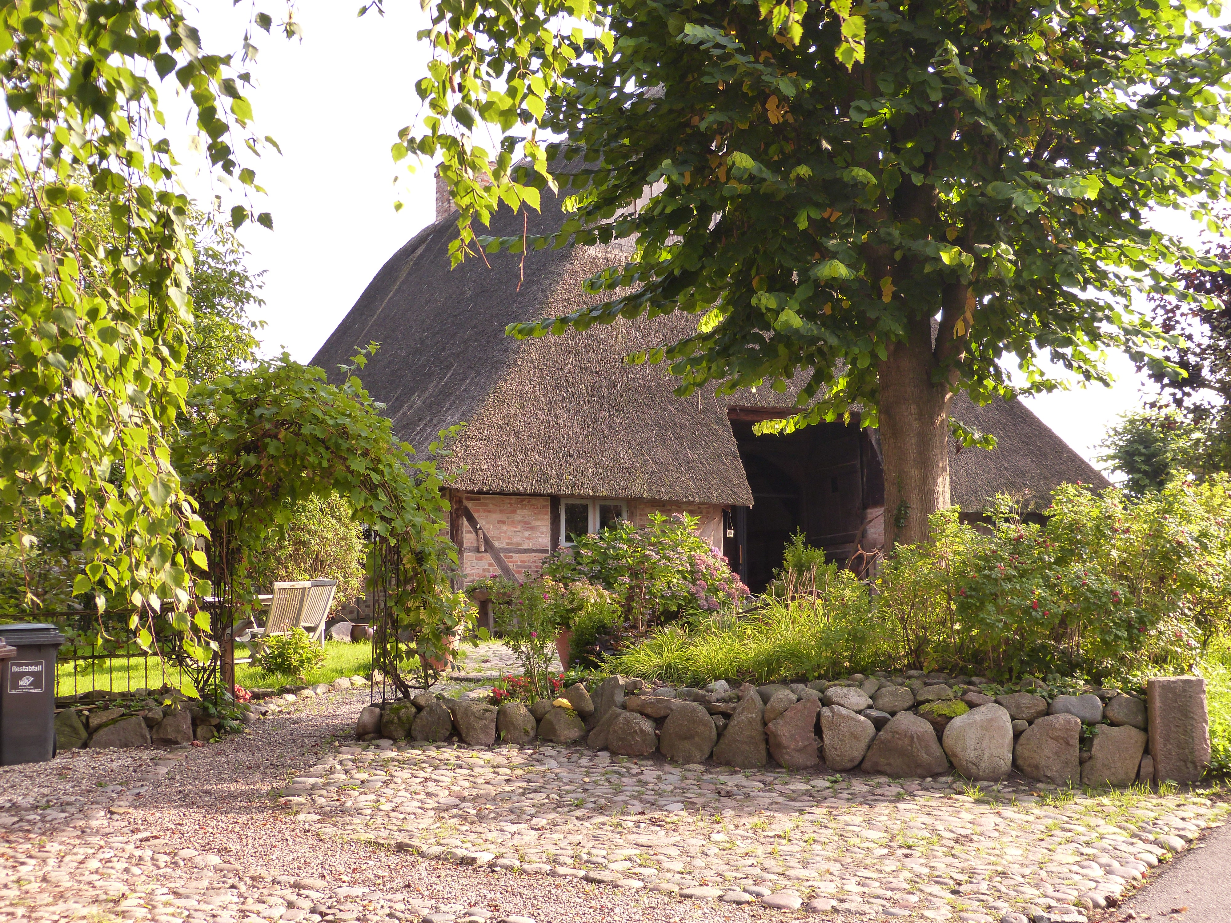 Das Bild zeigt ein Kulturdenkmal in Sievershütten, Kirchstraße 11, eine Fachhallenkate.